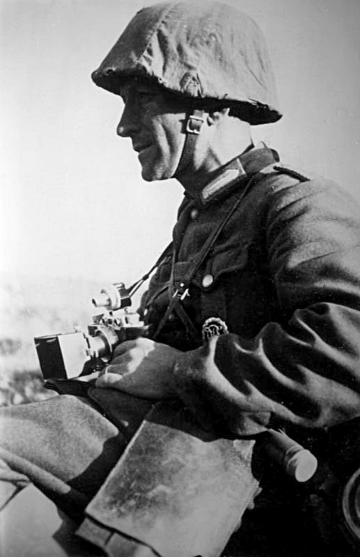 Russland, PK-Bildberichter mit Kamera An der Sowjetfront: Das Gesicht des PK-Bildberichters. Ein Infanterist unter Infanteristen, so hockt der PK-Bildberichter in seinem Schützenloch. In wenigen Minuten tritt das Bataillon zum Angriff an; dann stürmt er mit vor. Seine Waffe ist die Kamera. Er schafft die Bilddokumente, die der Heimat und der Welt vom Kampf und Sieg des deutschen Soldaten künden. PK-Aufnahme-Kriegsberichter: Schulte-Strathaus 10599-41 "Fr." "Fr.OKW" Nov. 41 [Sowjetunion.- Fotograf einer Propagandakompanie mit Stahlhelm und Leica]